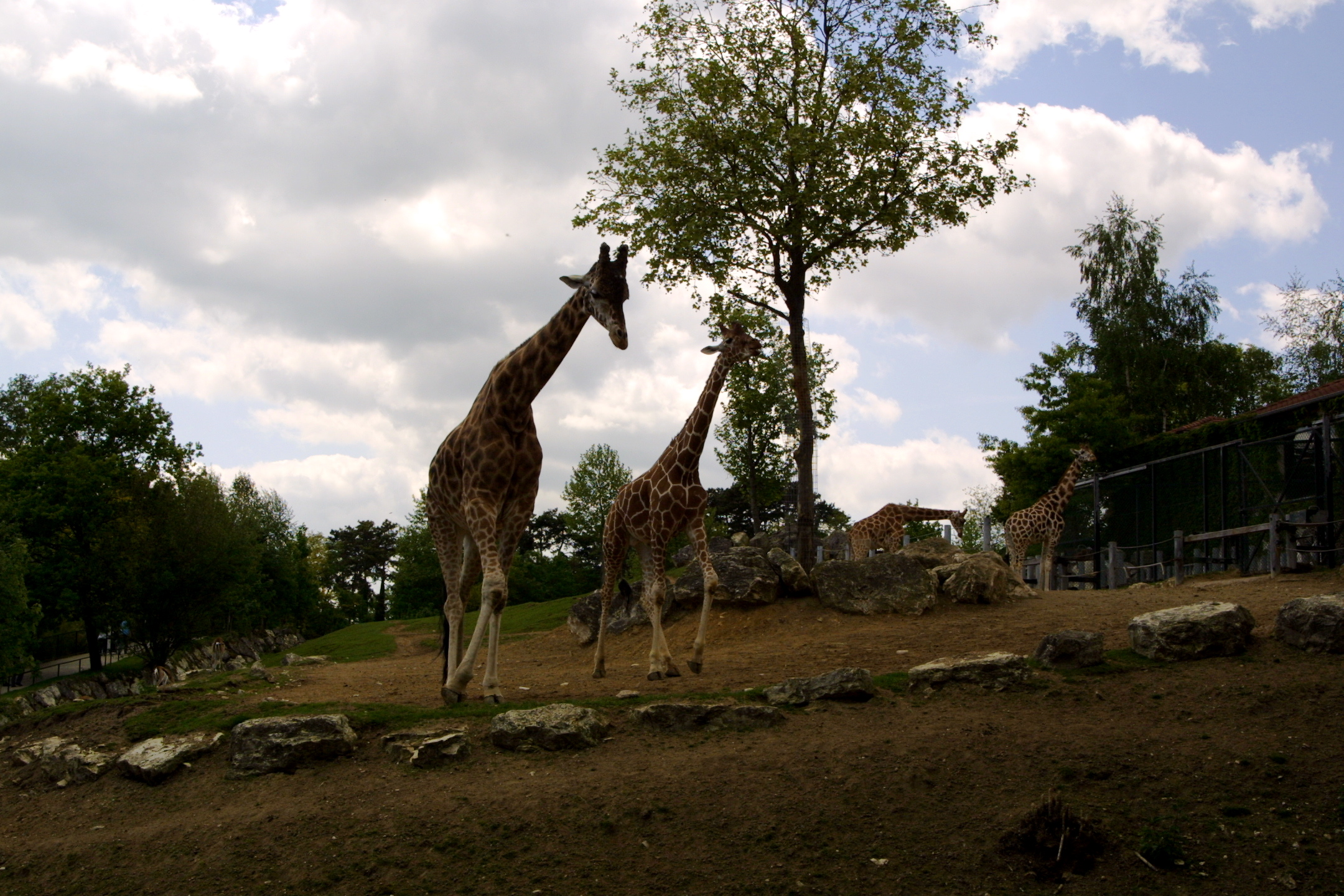 Groupe de girafes (Giraffa camelopardalis), dans la savane africaine du zoo de Beauval